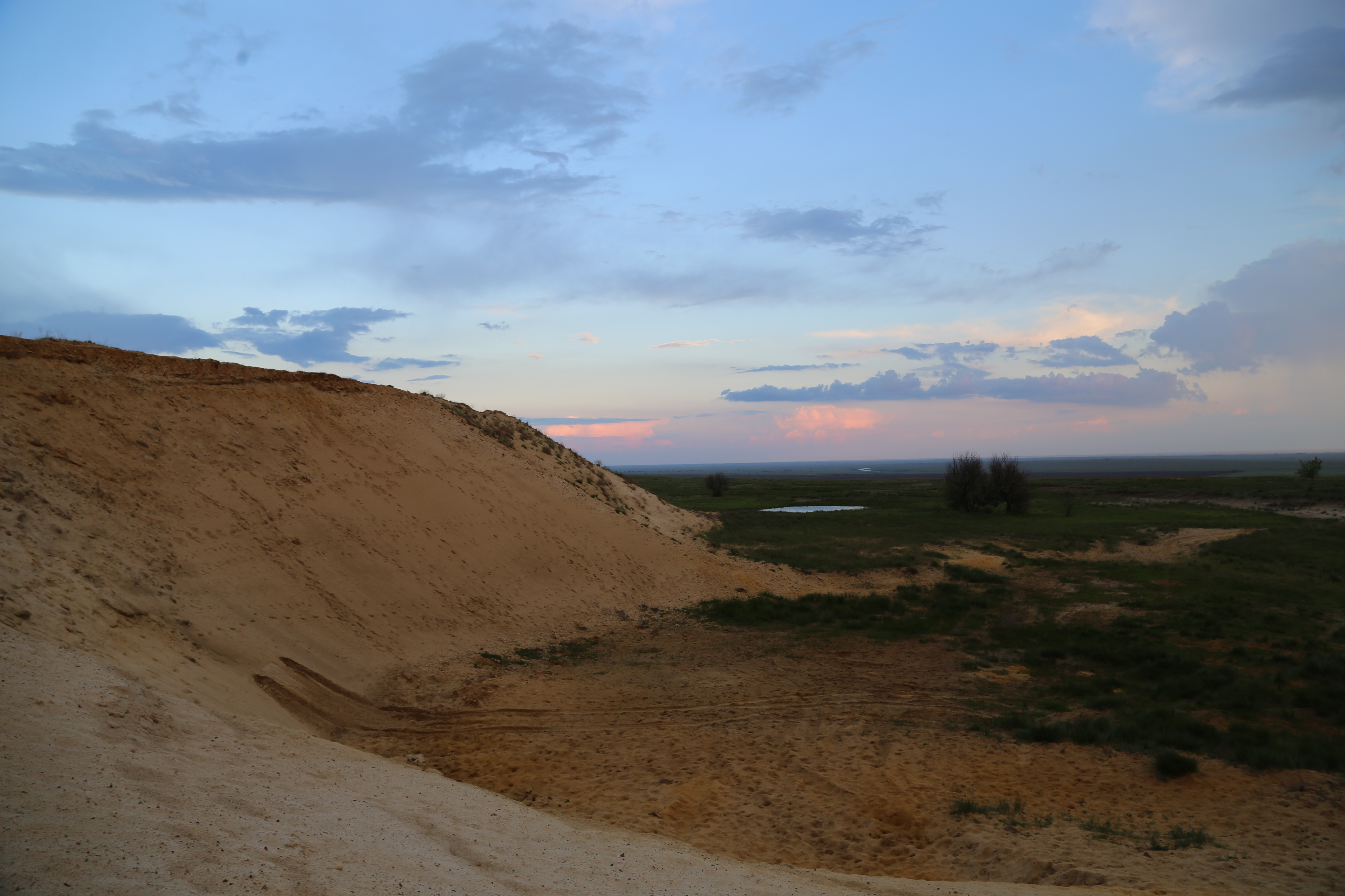 Зона сотрудничества с Государственным природным заповедником Ростовский: Ремонтненский район, Ростовская область This image is related to the protected area of Russia number 6120110